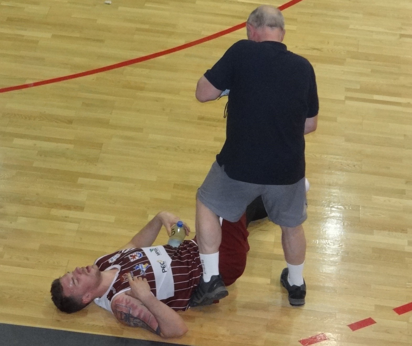 Trener odnowy Grzegorz Gromek i Alan Czujkowski (29.04.2018)